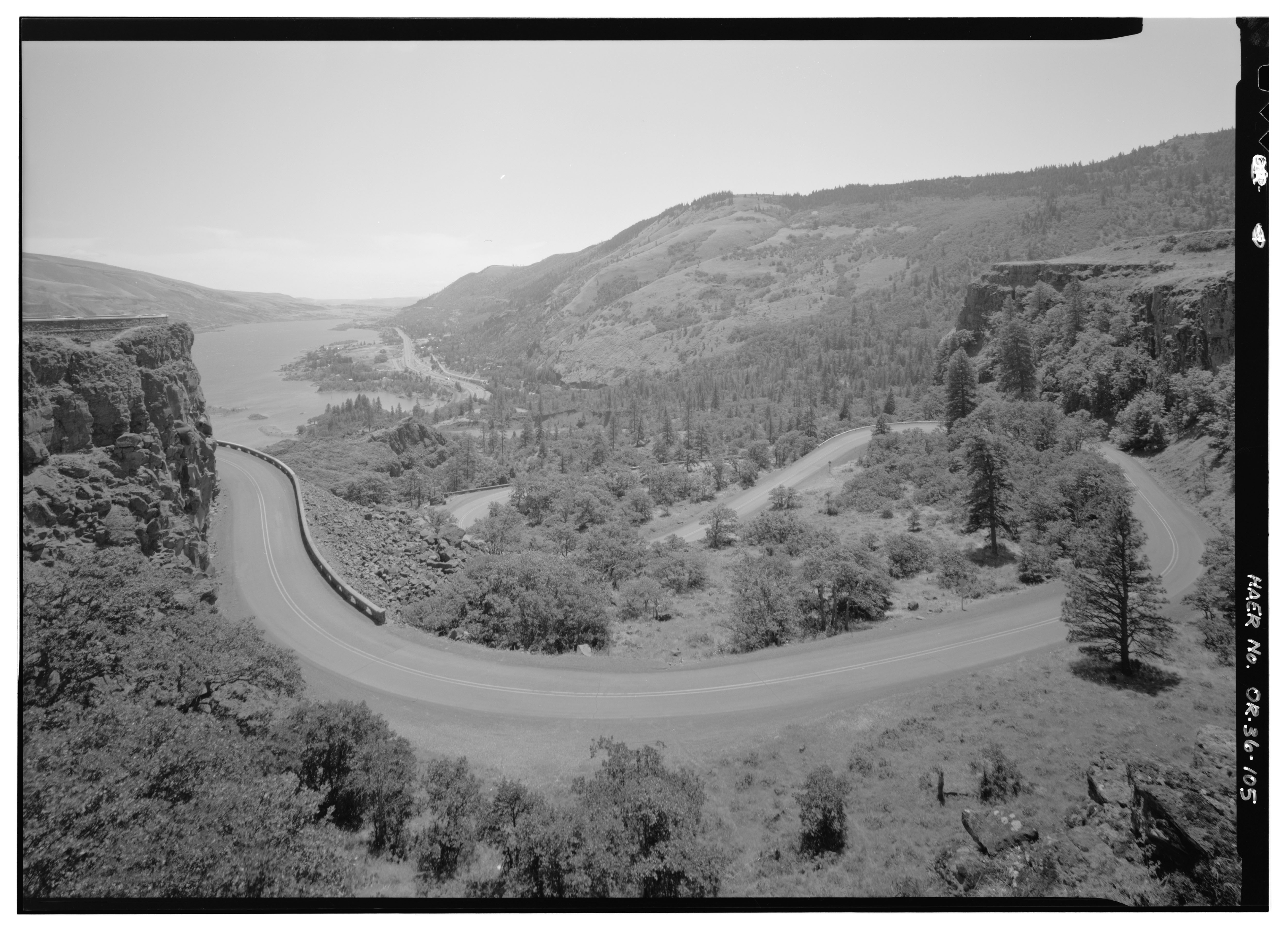 ROWENA LOOPS, LOOKING 102 DEGREES EAST.